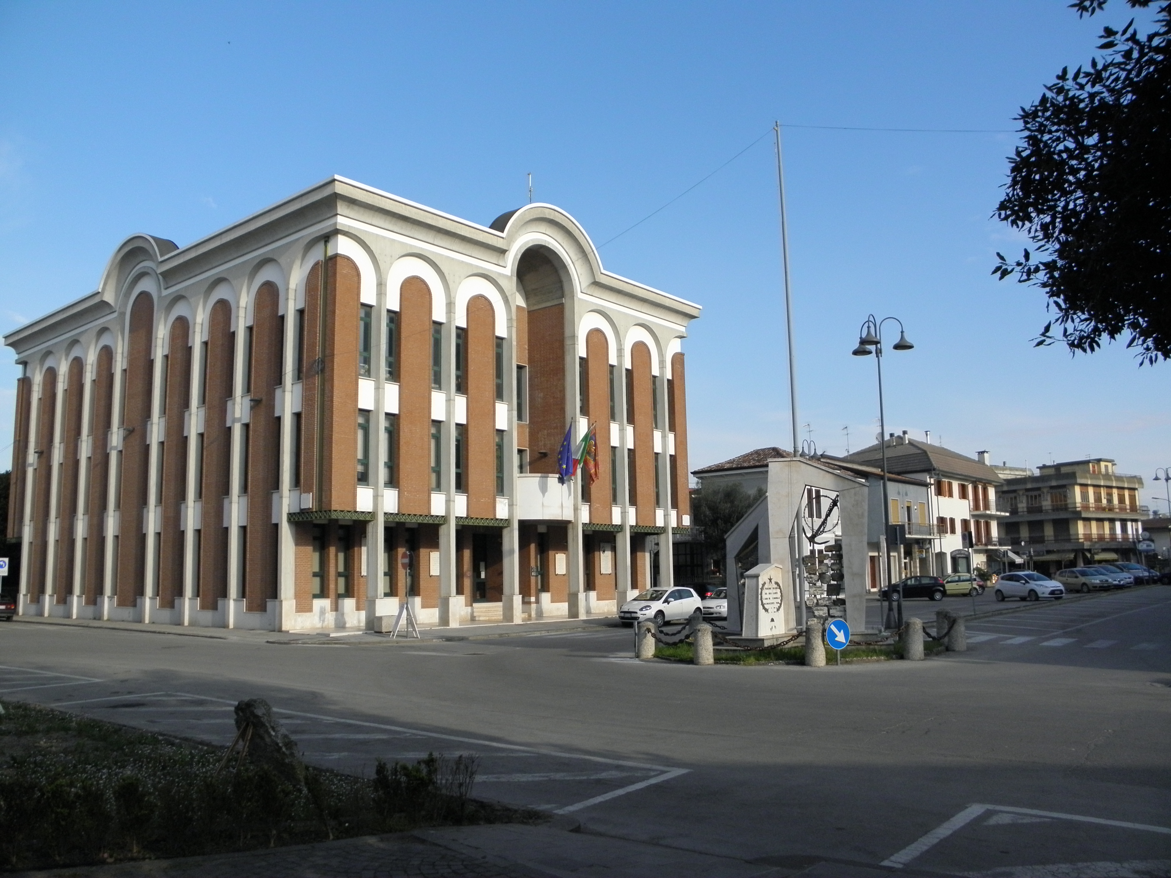 Taglio di Po, la palazzina municipale che si affaccia su Piazza IV Novembre.